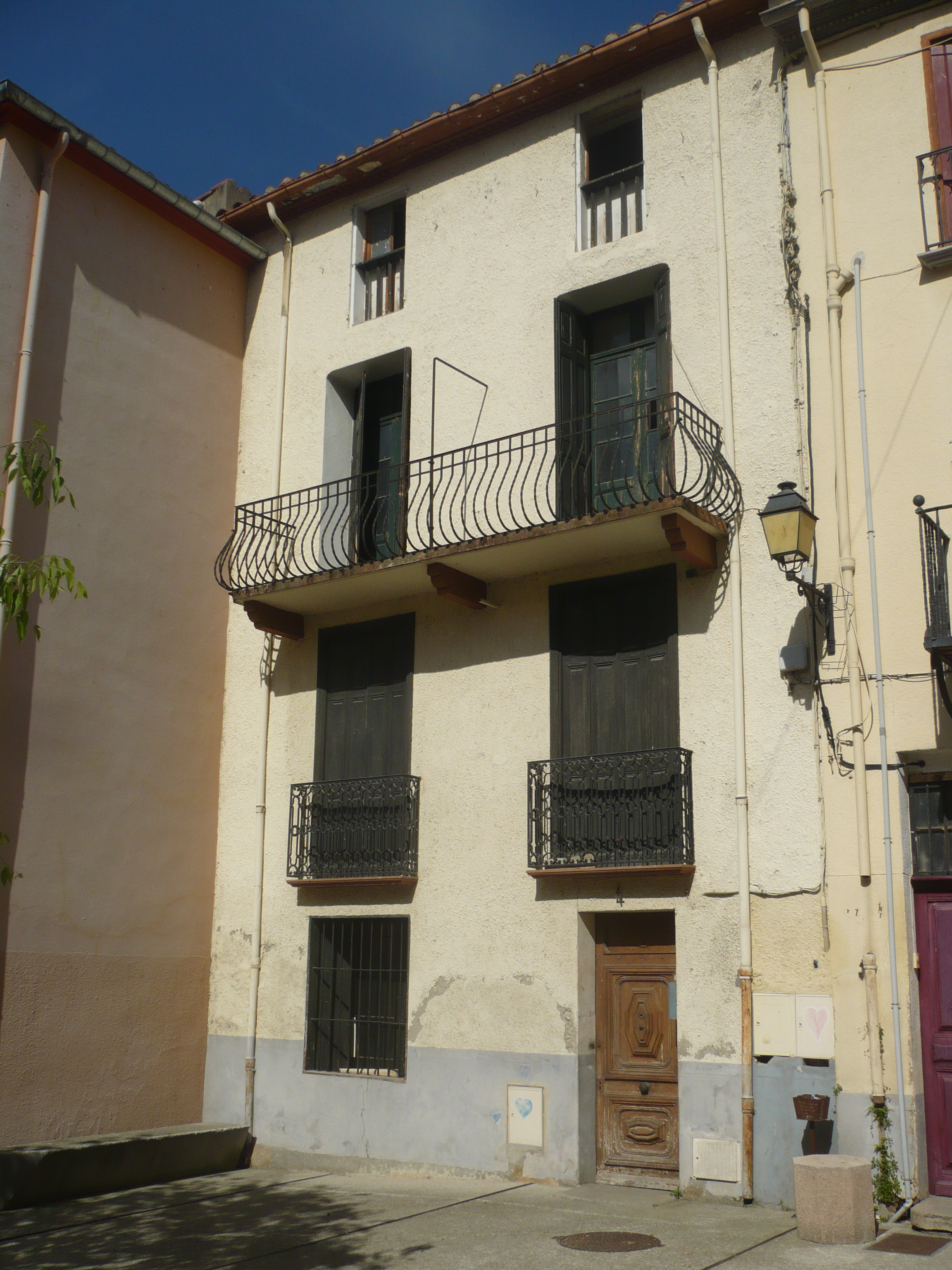 Maison sur La Place englobant l'église Saint-Étienne